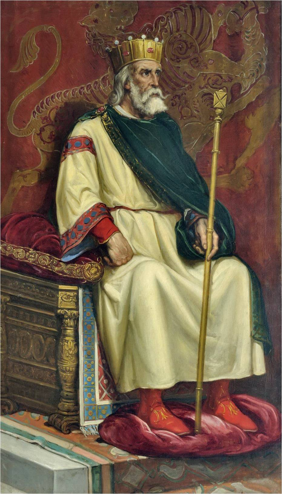 Retrato imaginario del rey Ordoño II de León (c.871-924). Fue hijo del rey Alfonso III de Asturias y de la reina Jimena de Asturias. Sometió a su autoridad los territorios del reino leonés y combatió exitosamente contra los musulmanes, que aún dominaban la mayor parte de la Península Ibérica. Su reinado supuso el tránsito tácito y tranquilo del reino de Asturias al reino de León, con la sede regia ya establecida definitivamente en la ciudad de León, en cuya cathedral fue sepultado.